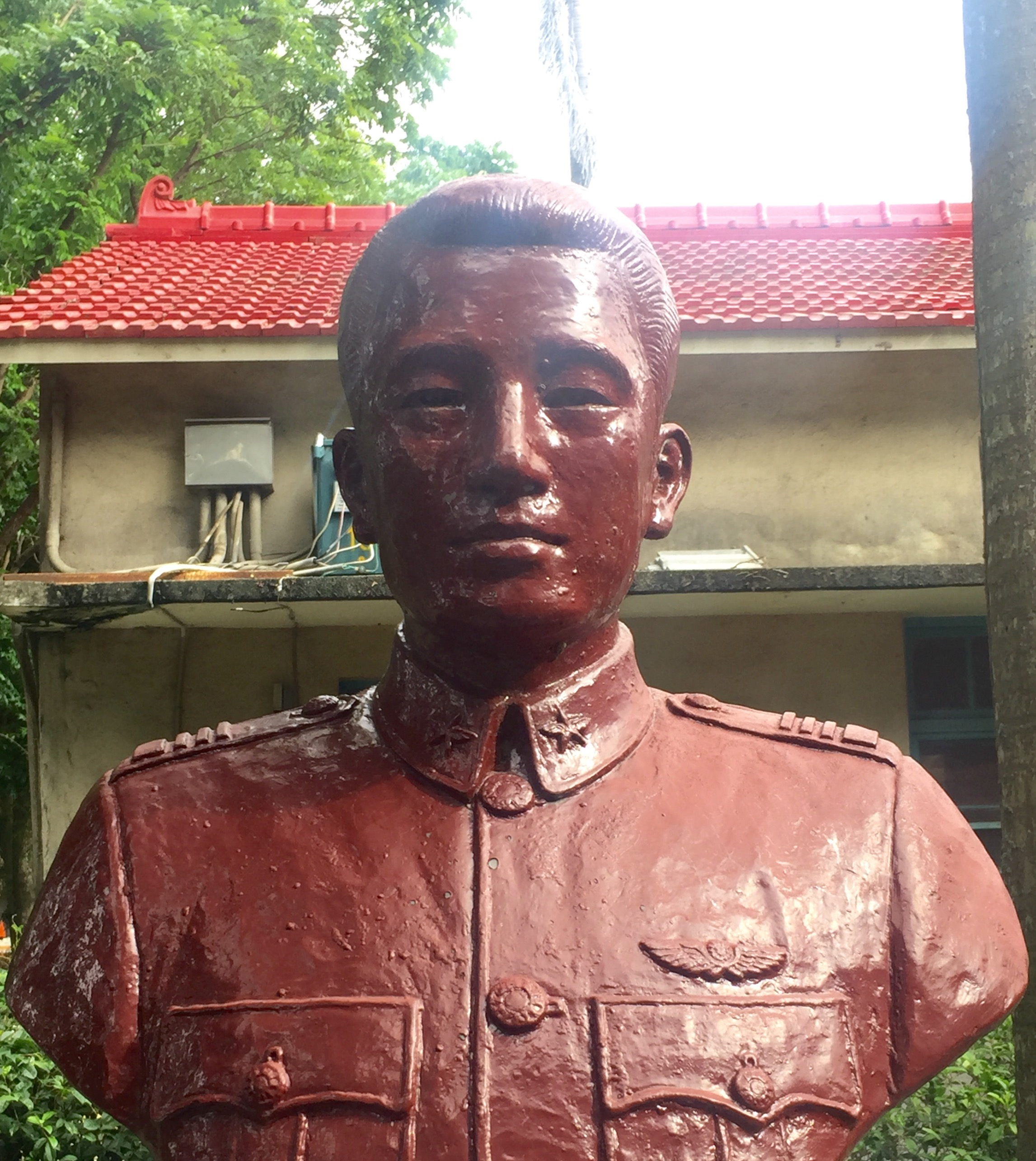 葉拯民銅像